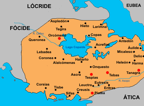 Mapa de la antigua Beocia.